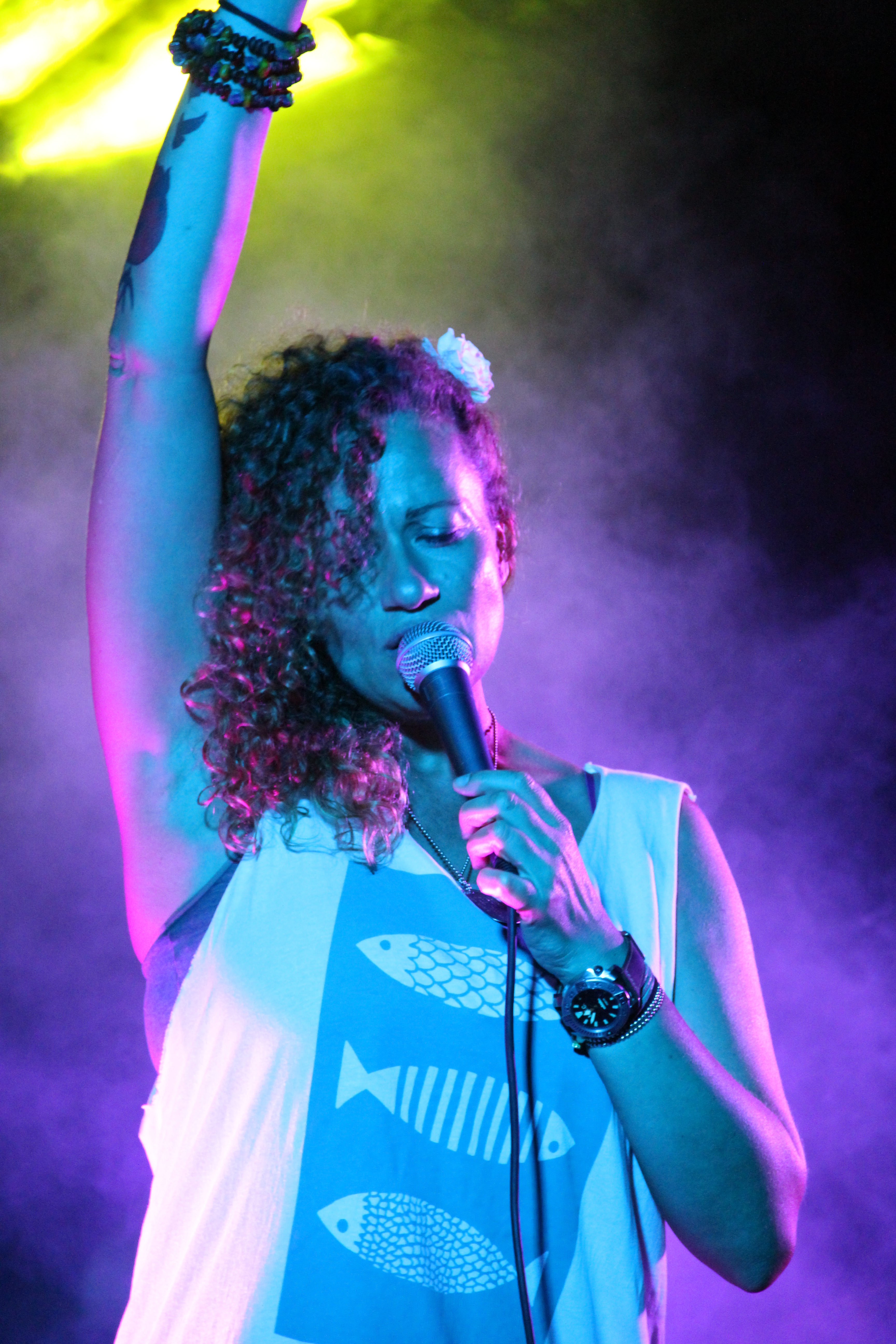 Белослава